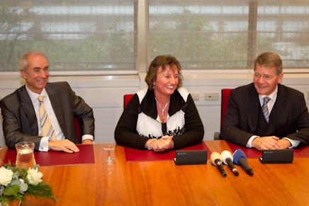 Leers, Spies en Donner bij de overdracht. Piet Hein Donner droeg op 16 december 2011 de portefeuille van het ministerie van Binnenlandse Zaken en Koninkrijksrelaties over aan Liesbeth Spies terwijl het onderdeel Integratie over ging naar de portefeuille van minister Gerd Leers, vanaf dan minister voor Immigratie, Integratie en Asiel.